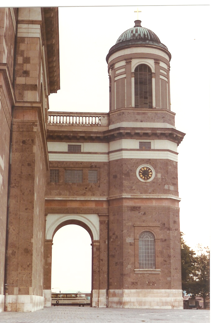 Säitefligel vun der Kathedral vun Esztergom